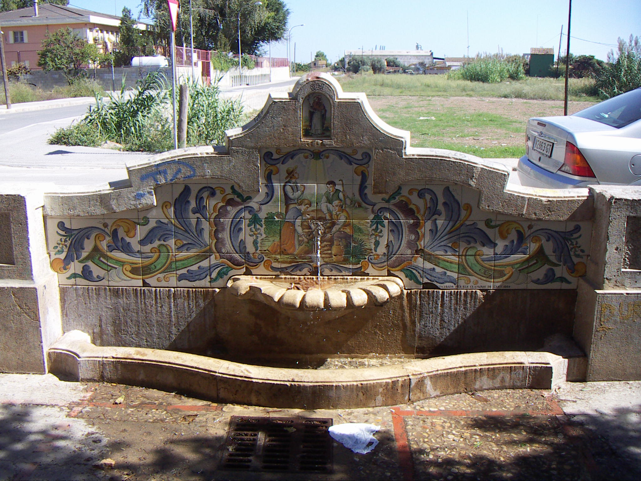 Font de sant Lluís situada devora l'església d'aquest nucli urbà.